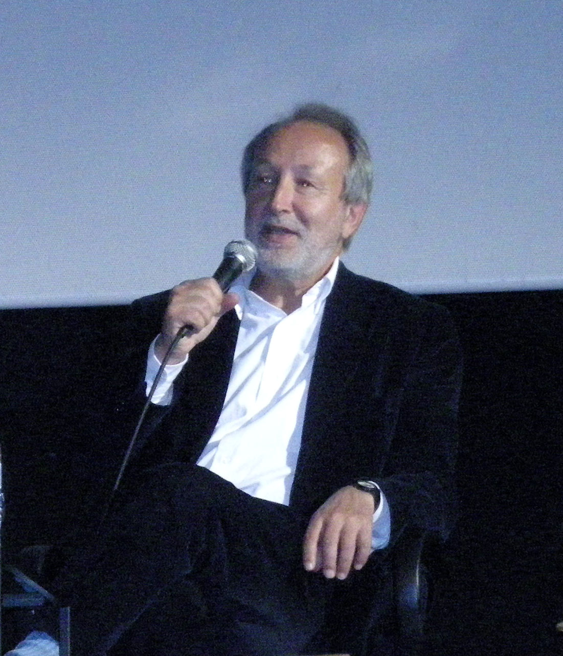 Jérôme Clément, ancien président d'ARTE, au 19ème Festival international de géographie de Saint-Dié-des-Vosges